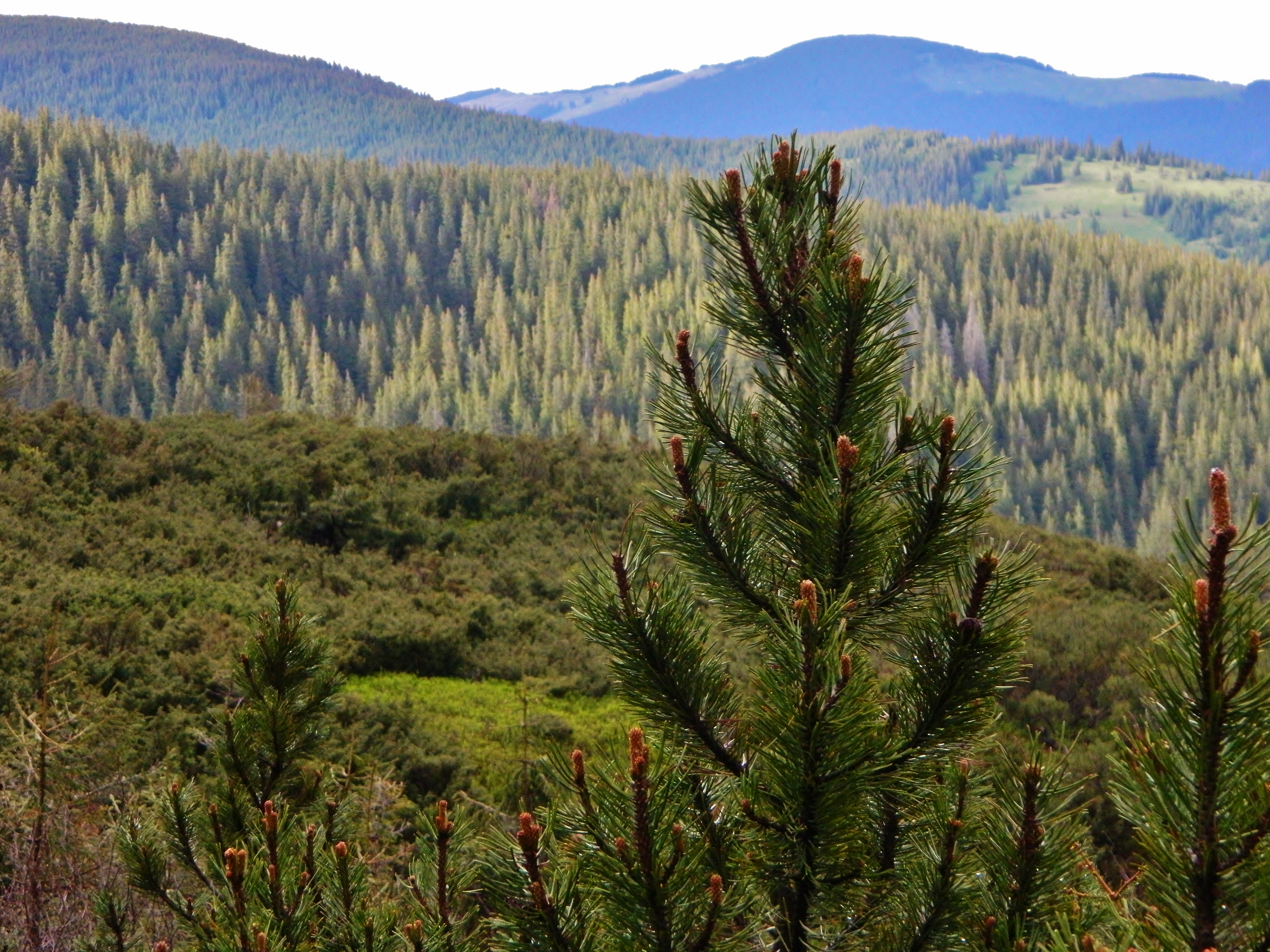 Гірська сосна на верхній межі лісу в Чорногорі. Схил Пожижевської